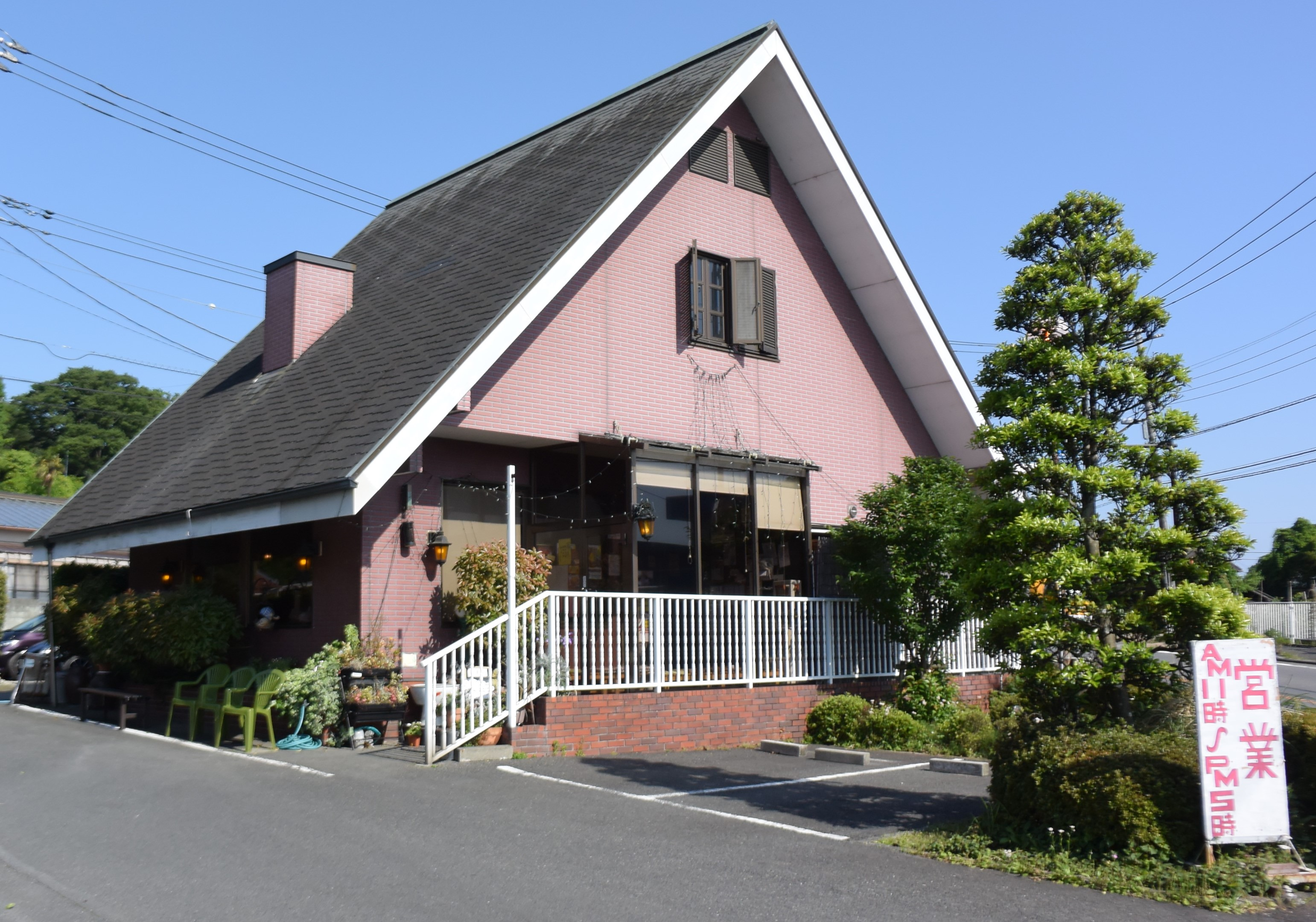 中華四川・外観